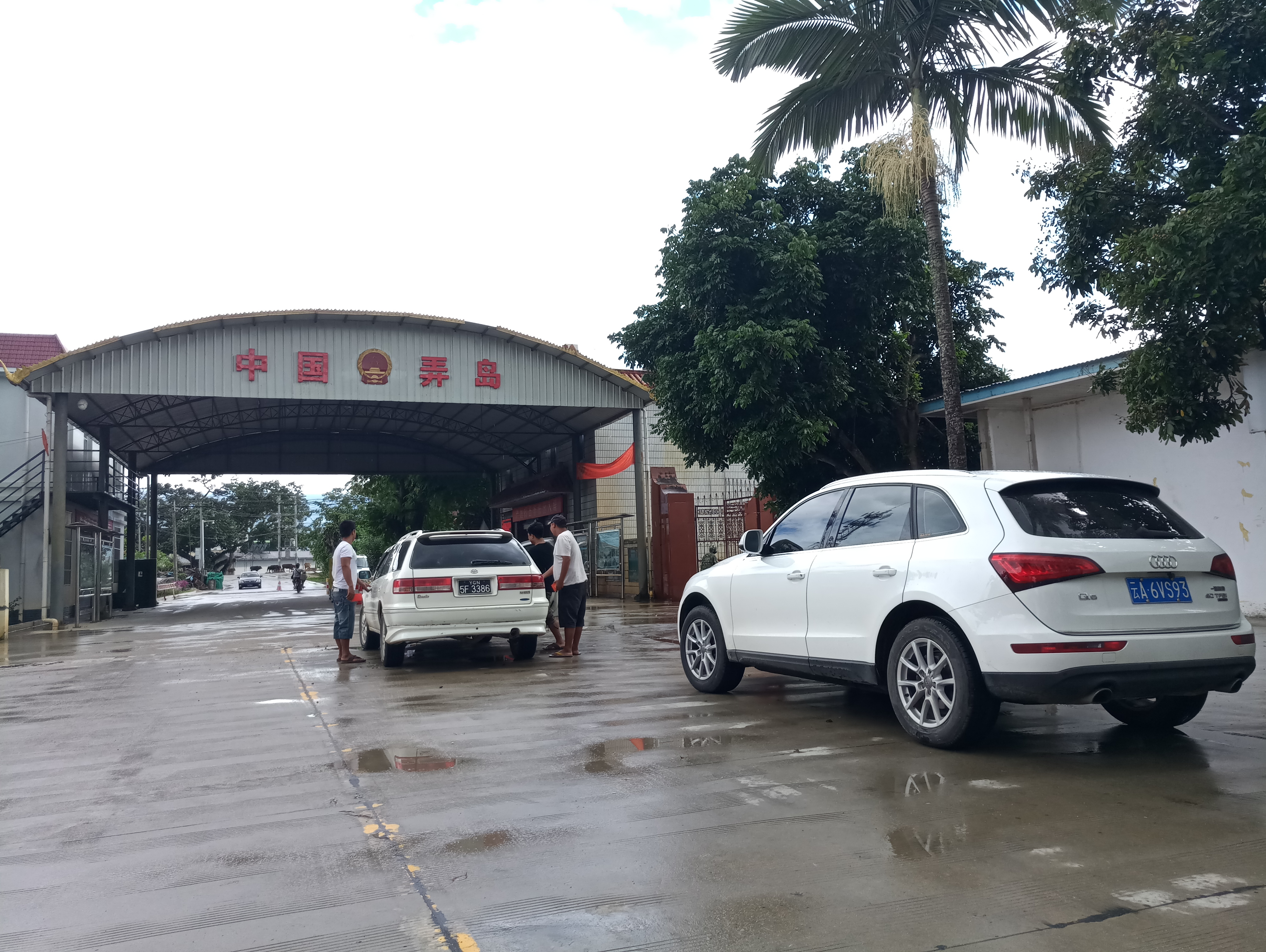 中文（中国大陆）: 瑞丽市中缅边界弄岛通道